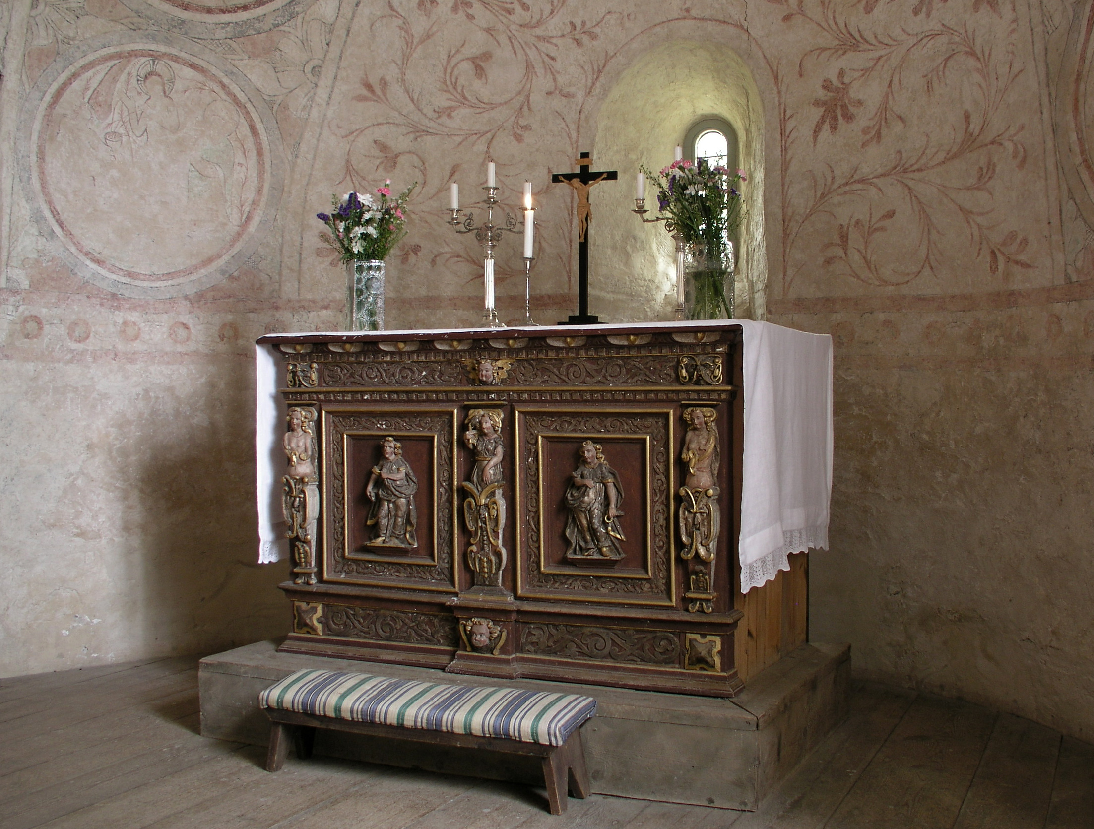 Kumlaby kyrka, Visingsö, Sweden. Altar.